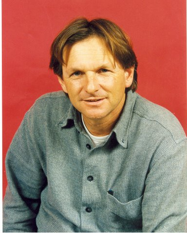 יואל שרון.